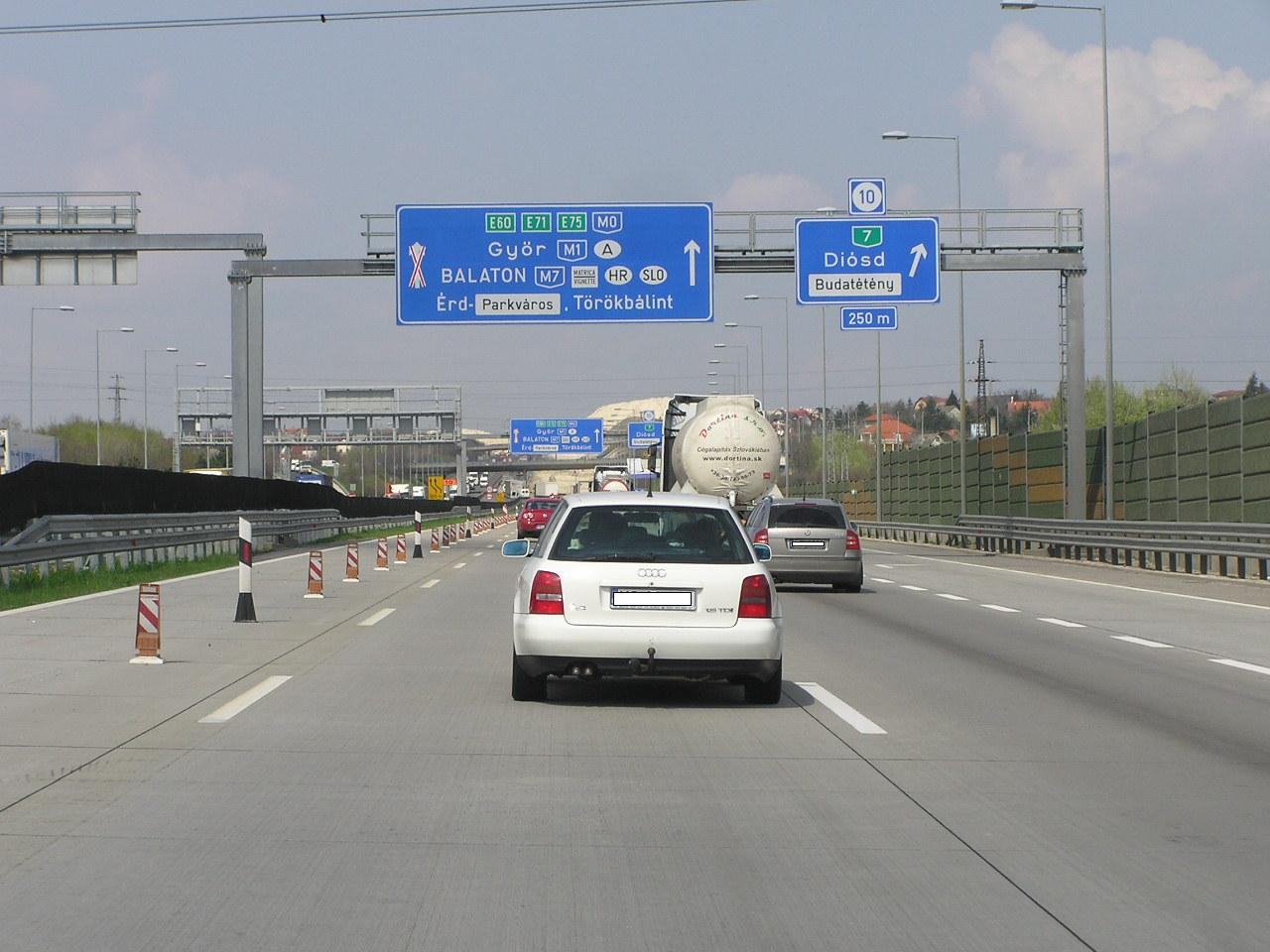 Autobahn M0 aus Richtung Autobahn M5 kommend.